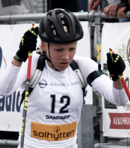 Kaisa Mäkäräinen under Blinkfestivalen i Sandnes 2009